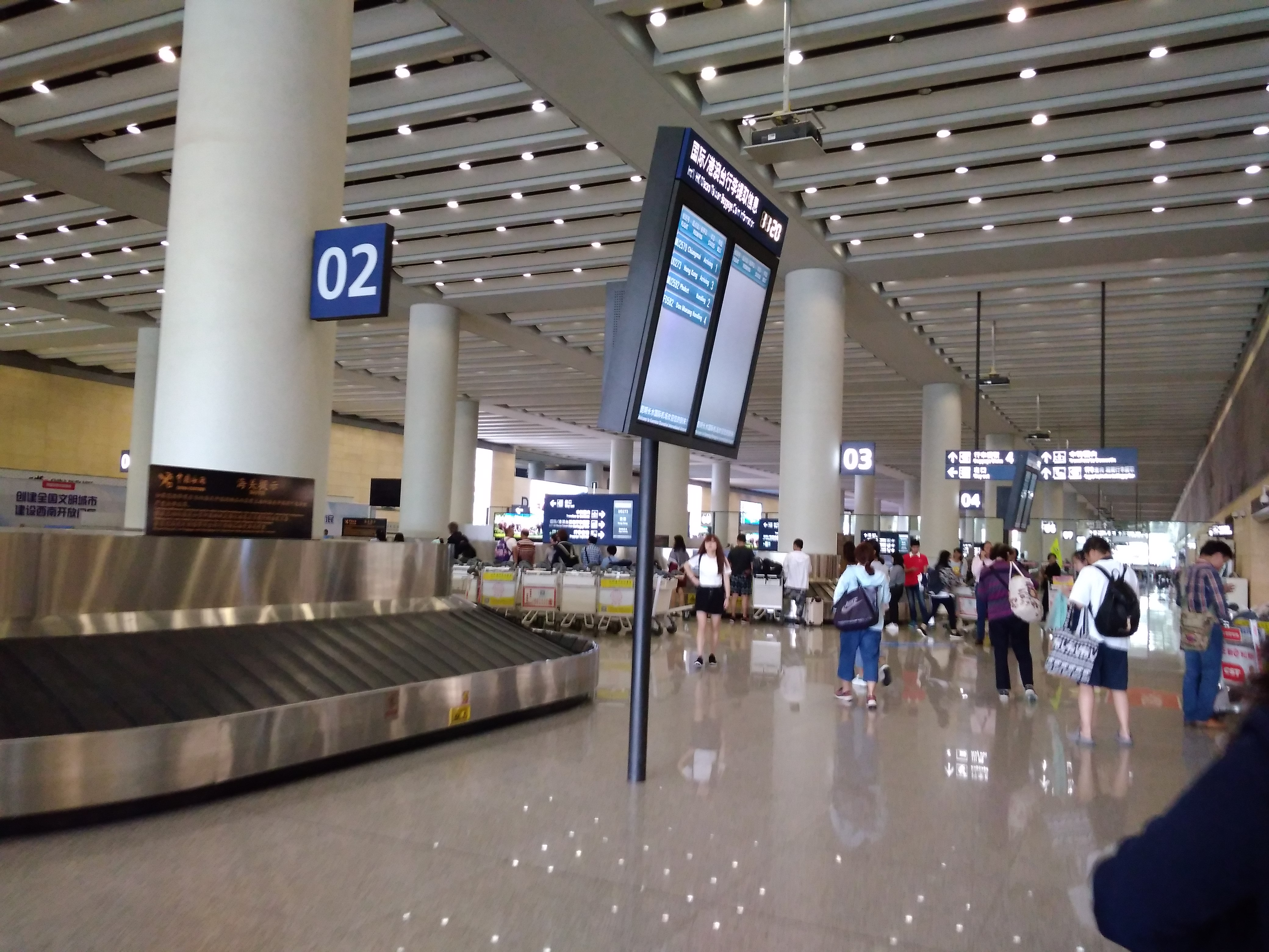 昆明國際機場行李輸送帶